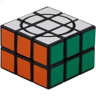 Puzzle